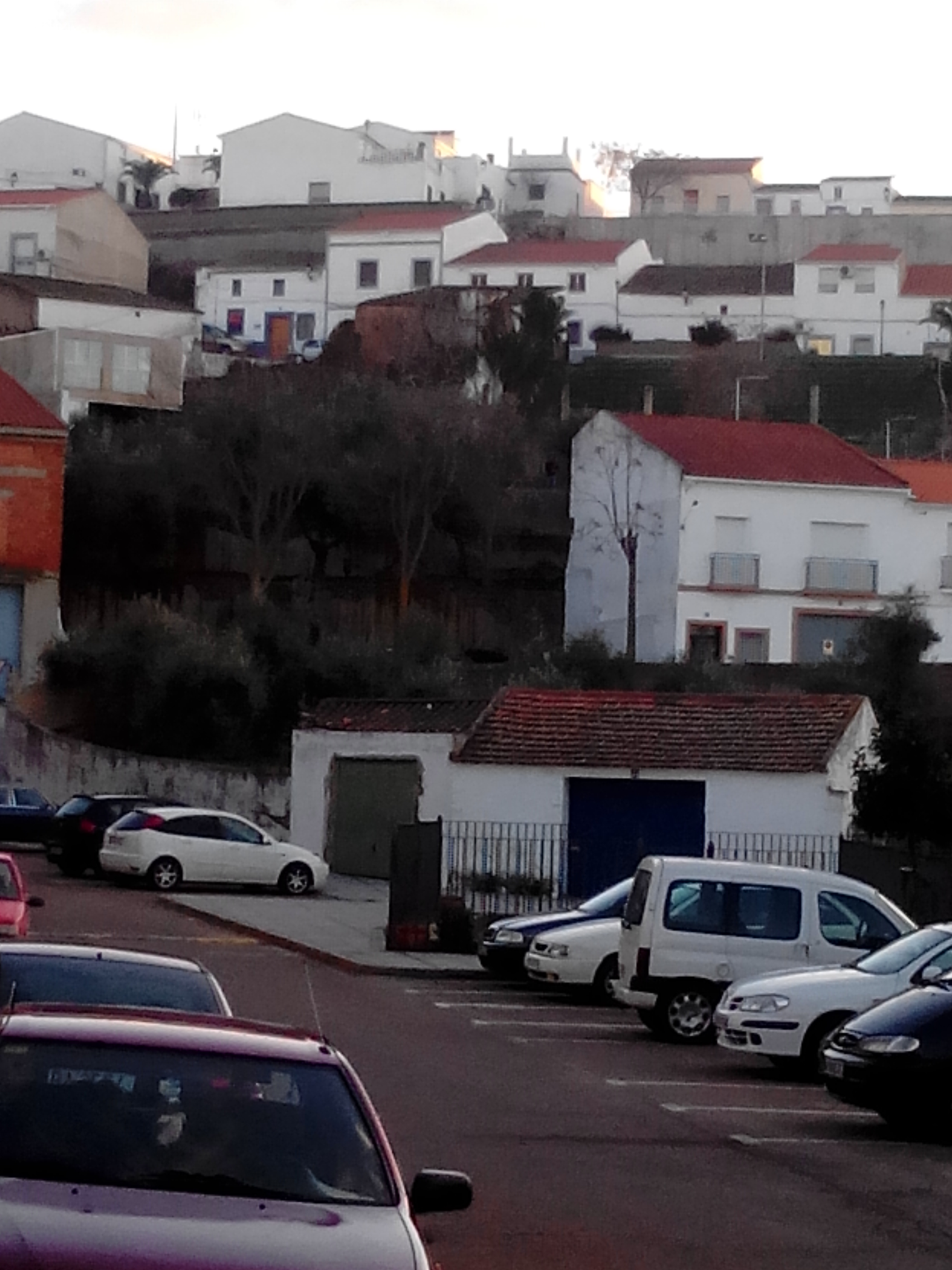 Parque vertical, en Castuera... una original vista y una forma aprovechar el paisaje de esta localidad